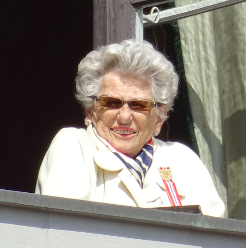 Astrid de Norvège, le 17 mai 2018 à Oslo lors de la fête nationale.